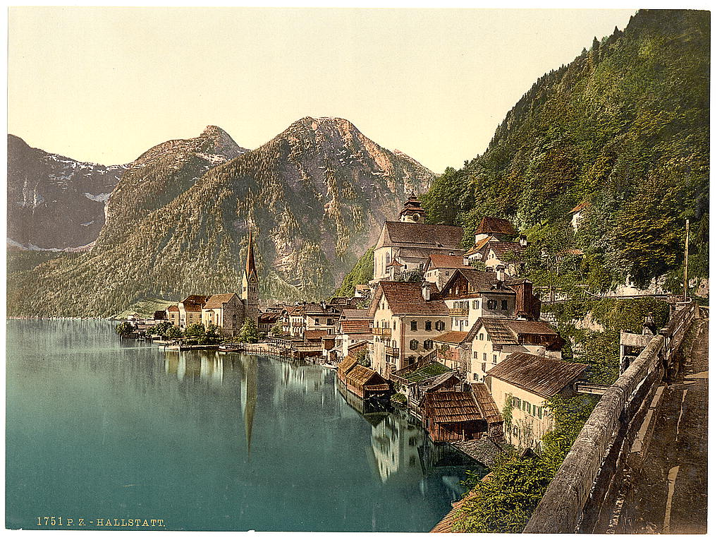 Hallstatt um 1900. Bootsanlegesteg, Bootslände, Bootshäuser, 2 Telegraphen- oder Strommasten.